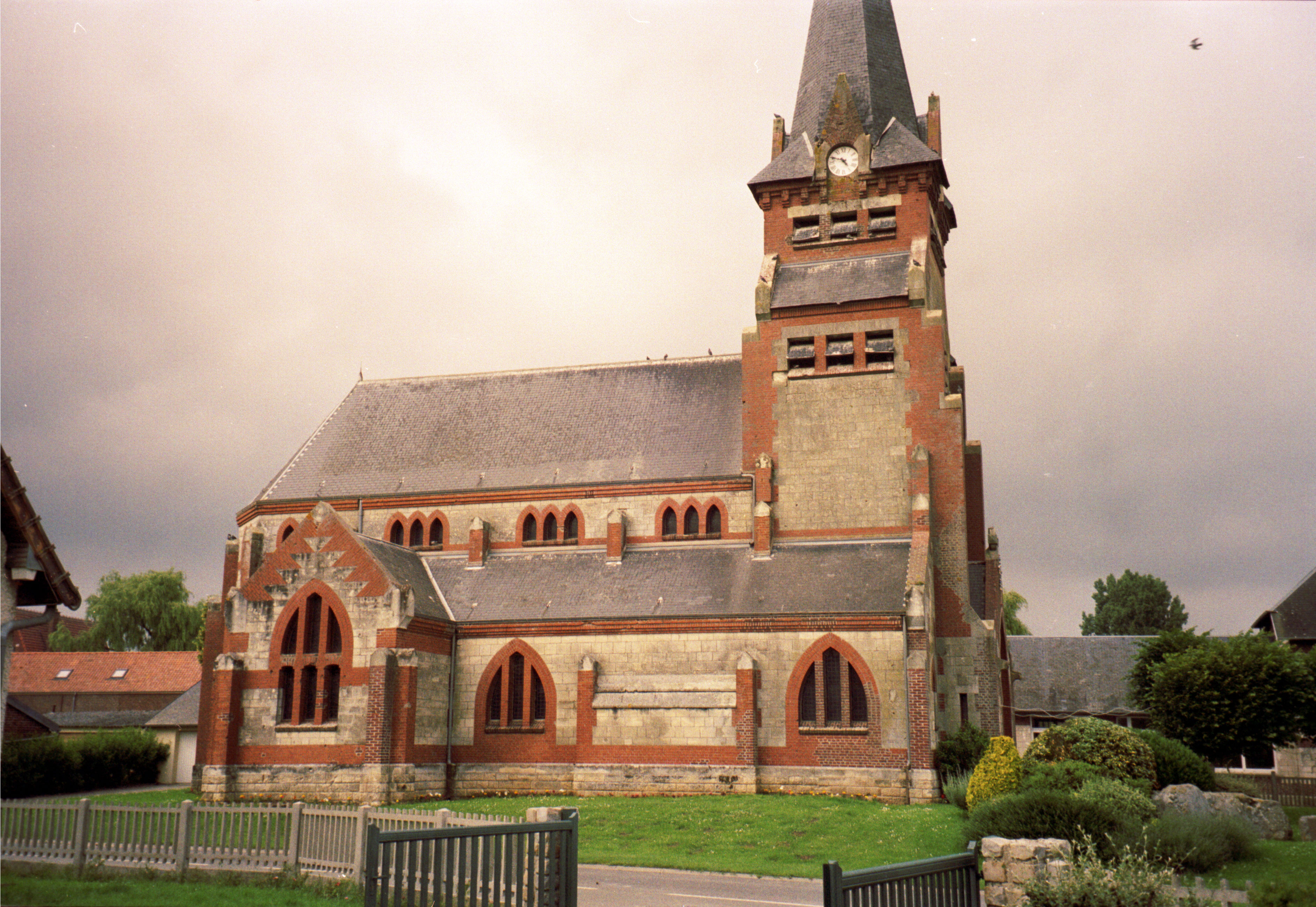 The church of Assevillers, Somme Department, Picardie Region, France